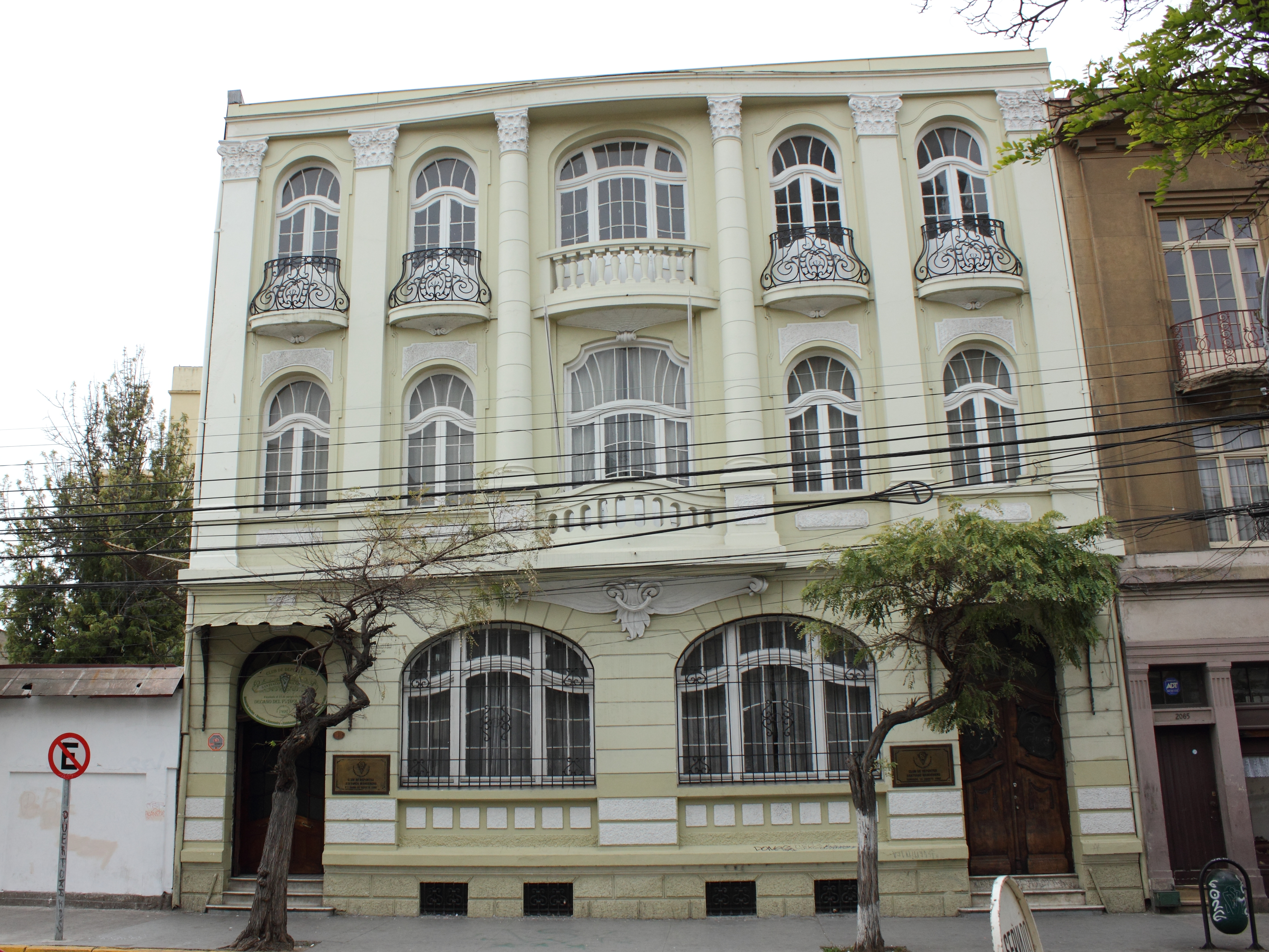 Casa Ballivián This is a photo of a national monument in Chile: 2047